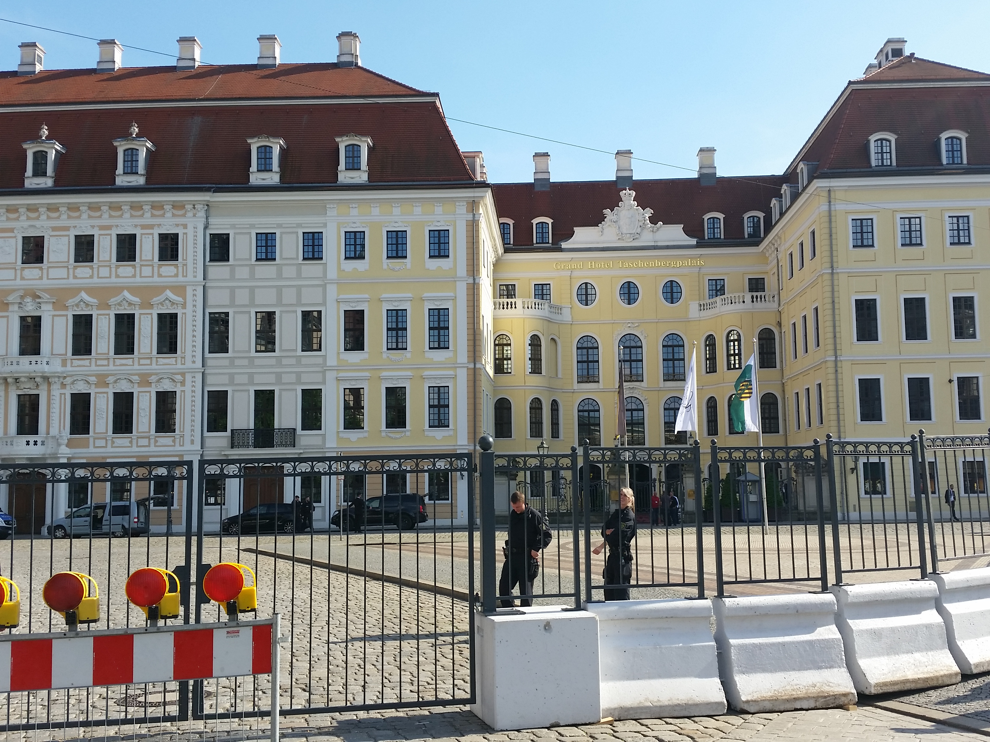 Das ****s-Hotel Taschenbergpalais in Dresden-Altstadt, mit Absperrungen für die Bilderberg-Konferenz 2016